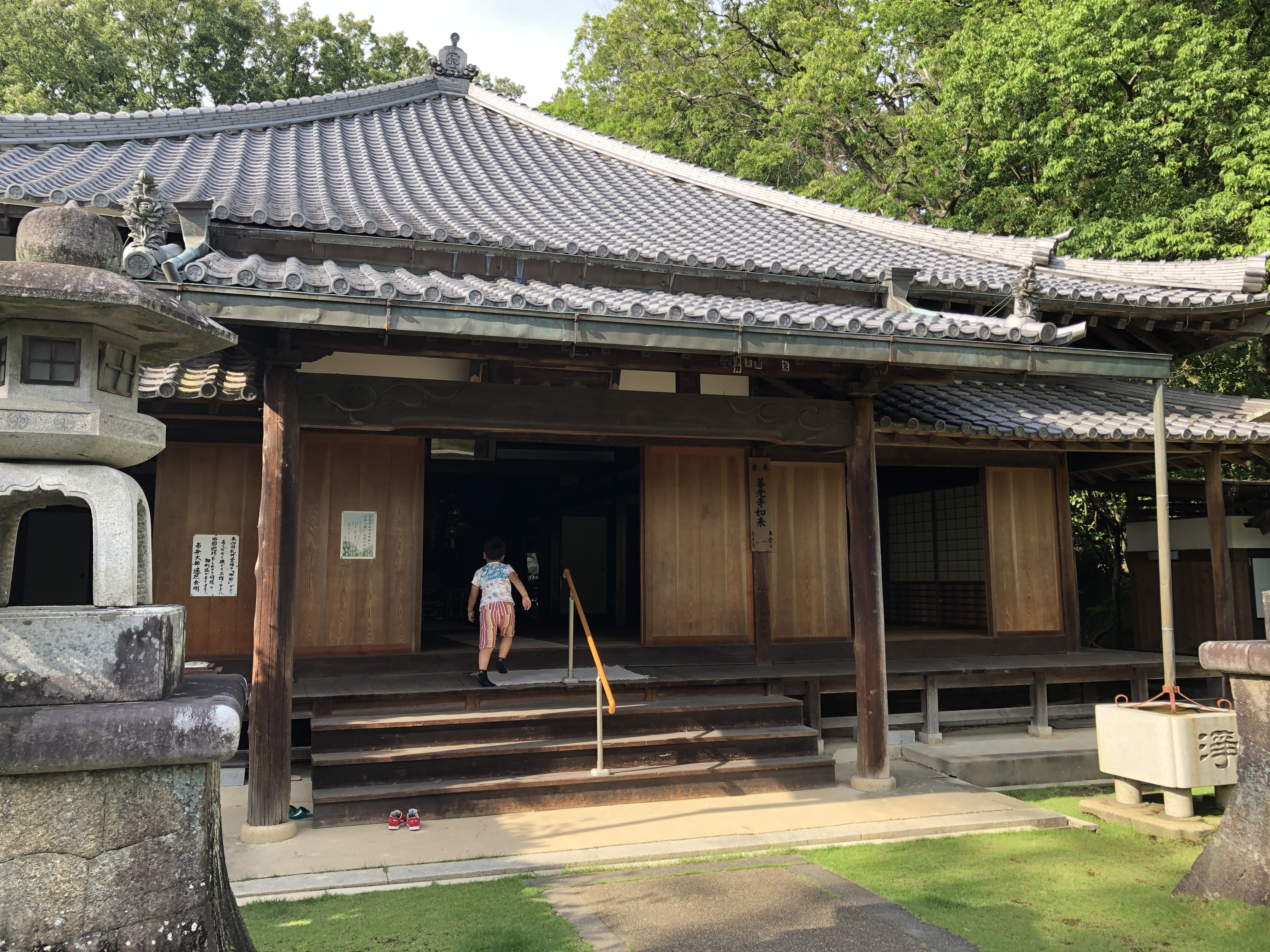 九品院（岡崎市鴨田町）